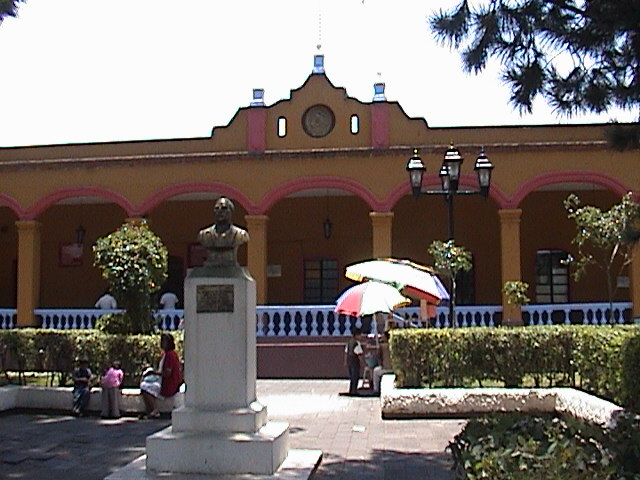 palacio de gobierno tlahuac